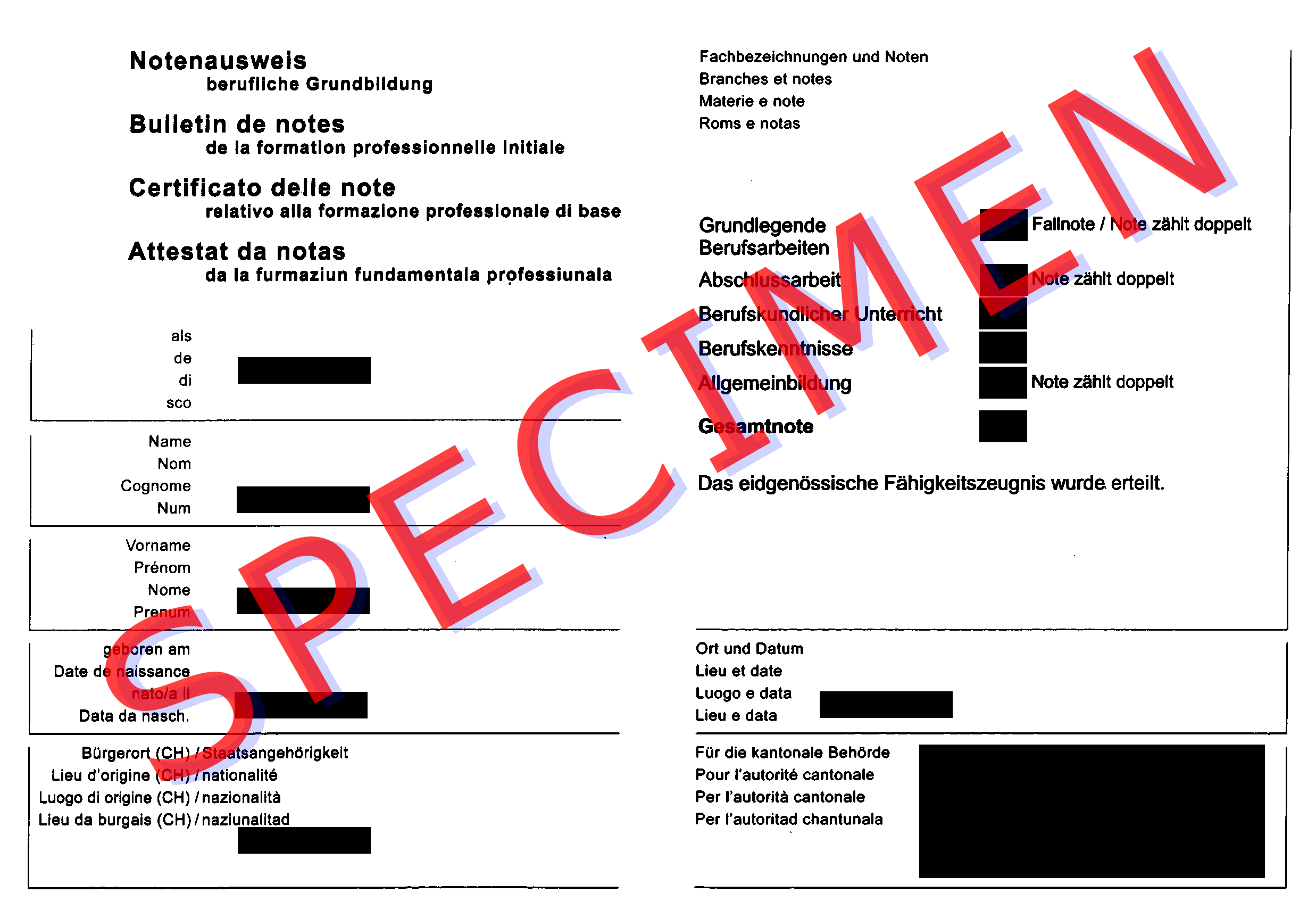 Notensausweis zum Fähigkeitszeugnis.